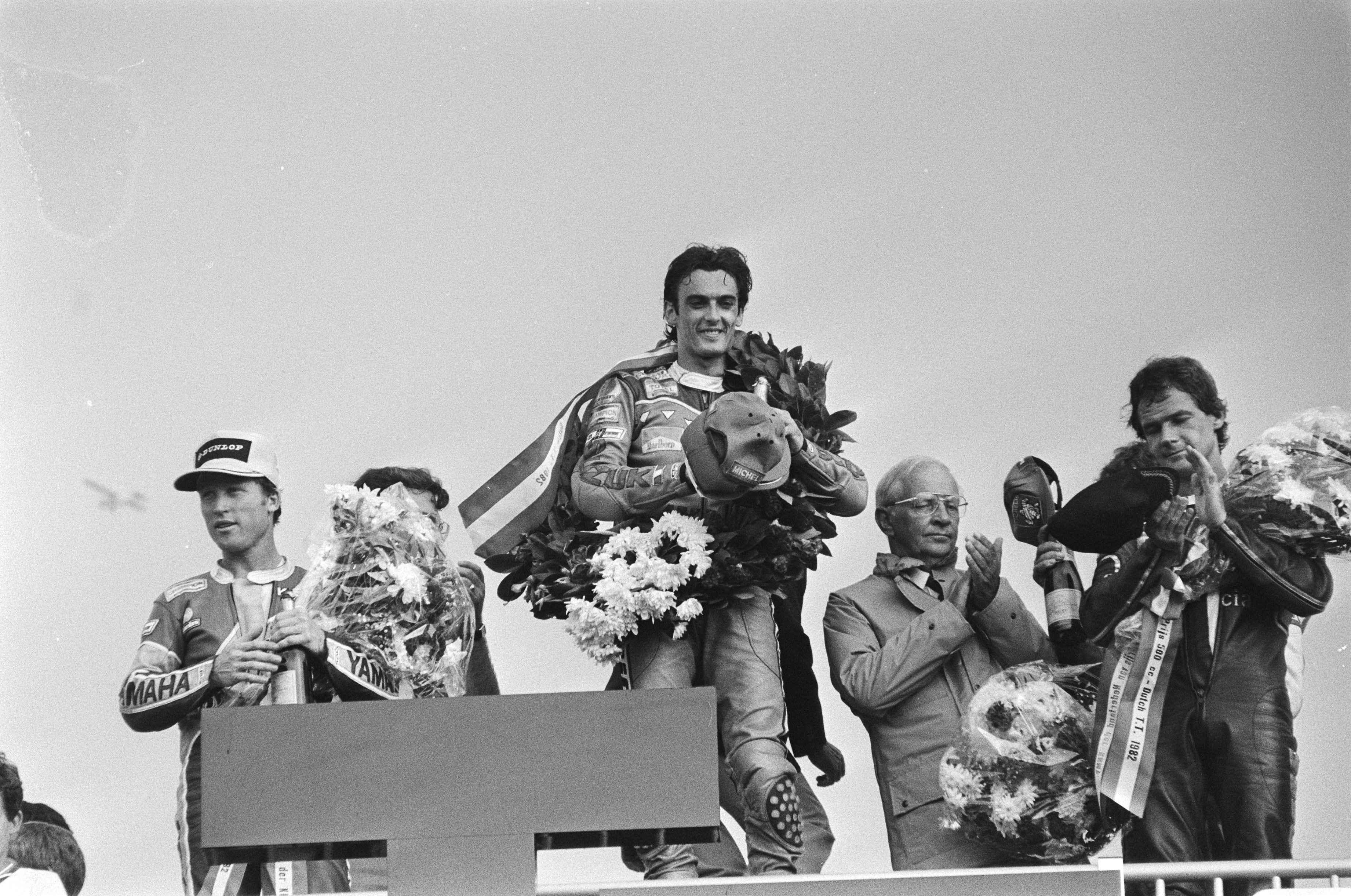 Collectie / Archief : Fotocollectie Anefo Reportage / Serie : TT Assen 1982 Beschrijving : TT in Assen; 500 cc tijdens huldiging v.l.n.r. Roberts, Uncini, Sheene Datum : 26 juni 1982 Locatie : Assen Trefwoorden : huldigingen, motorcoureurs, motorfietsen, motorraces, motorsport Persoonsnaam : Roberts, Kenny, Sheen, Barry, Uncini, Franco Fotograaf : Dijk, Hans van / Anefo Auteursrechthebbende : Nationaal Archief Materiaalsoort : Negatief (zwart/wit) Nummer archiefinventaris : bekijk toegang 2.24.01.05 Bestanddeelnummer : 932-2263